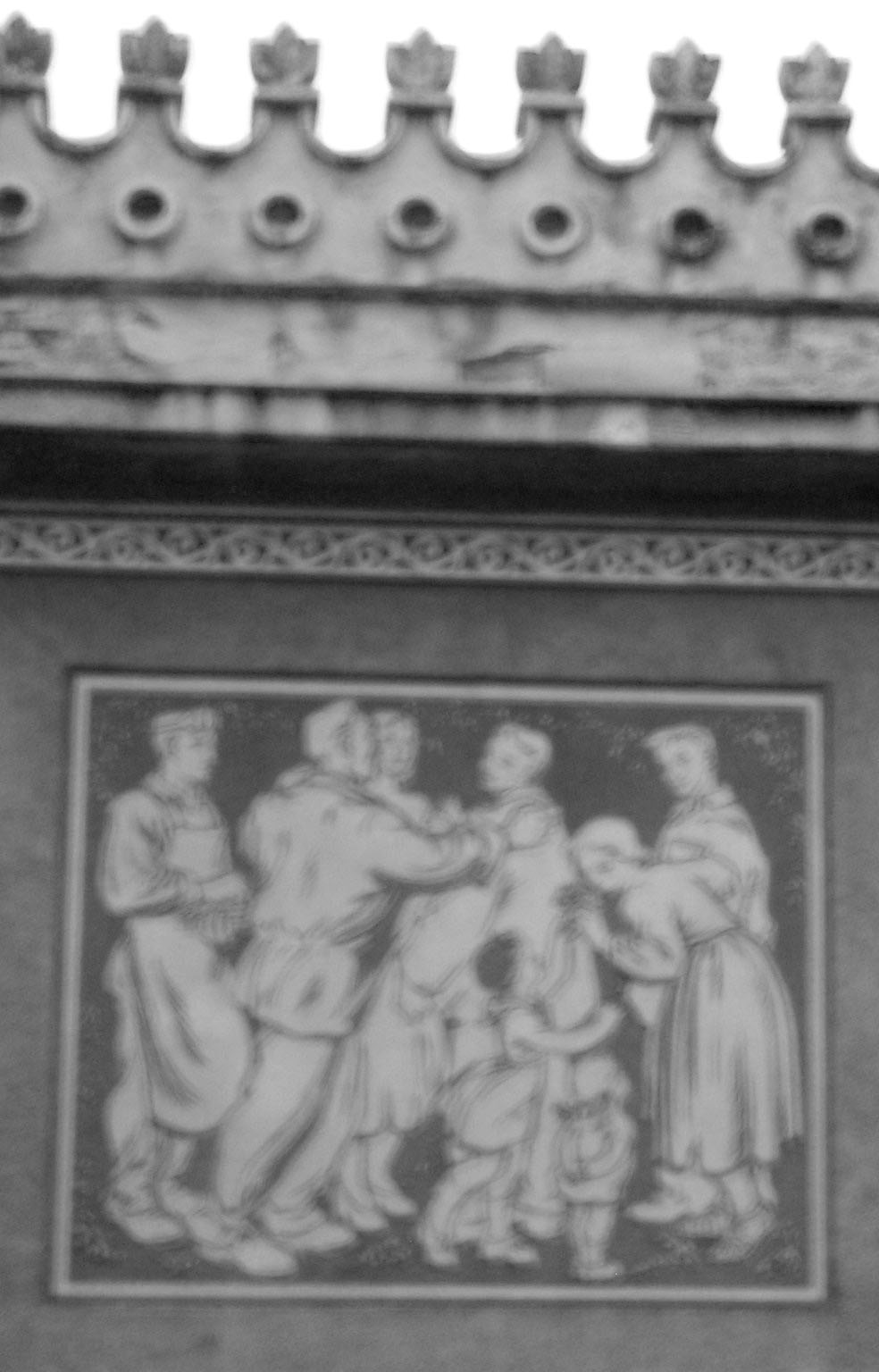 Detail fasády ve stylu socialistického realismu. Budova internátu Mladá garda z roku 1954 v Bratislavě, Nové Město, Račianska 103 detail fasady v style socialistickeho realizmu